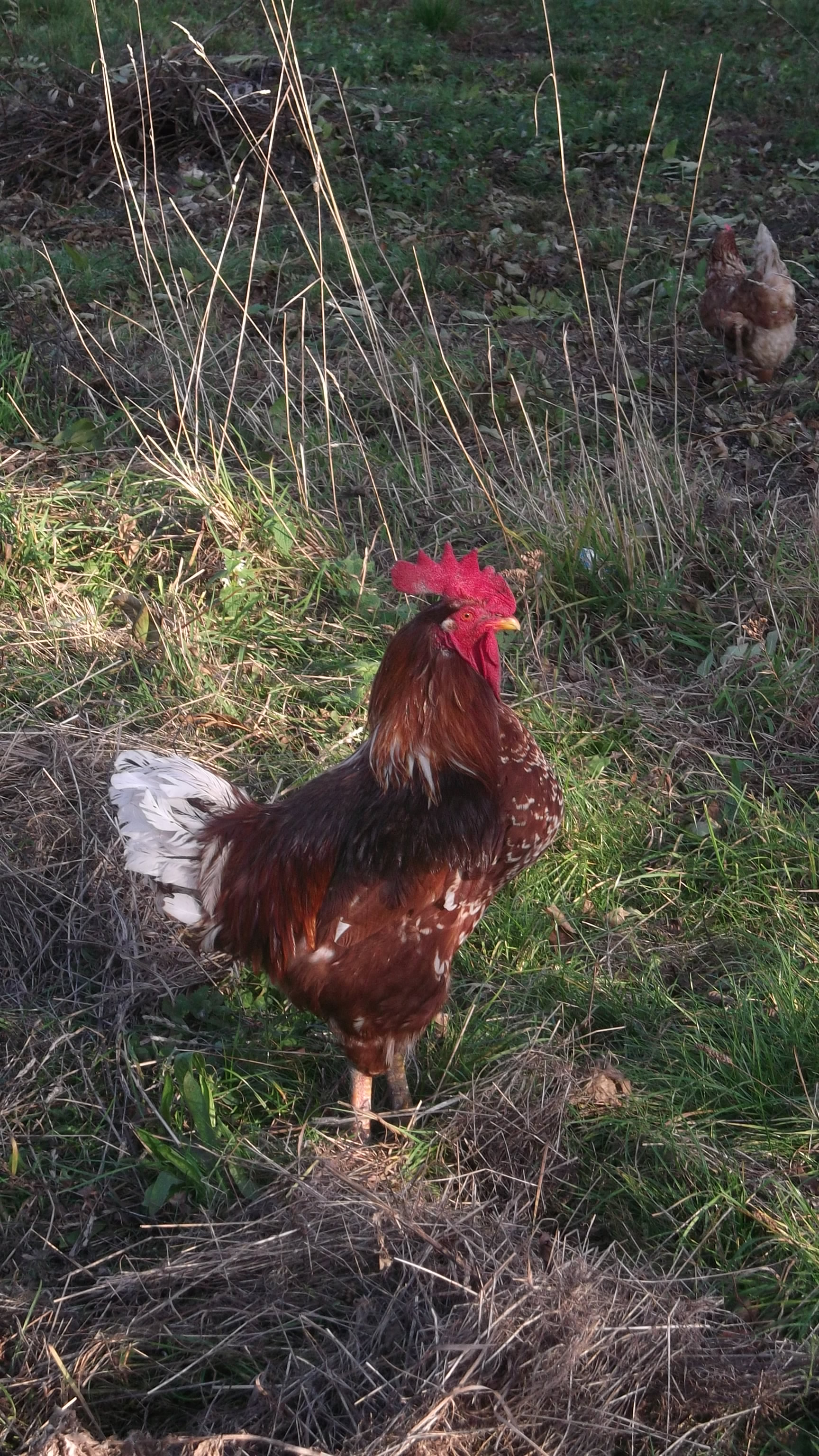 Kogut